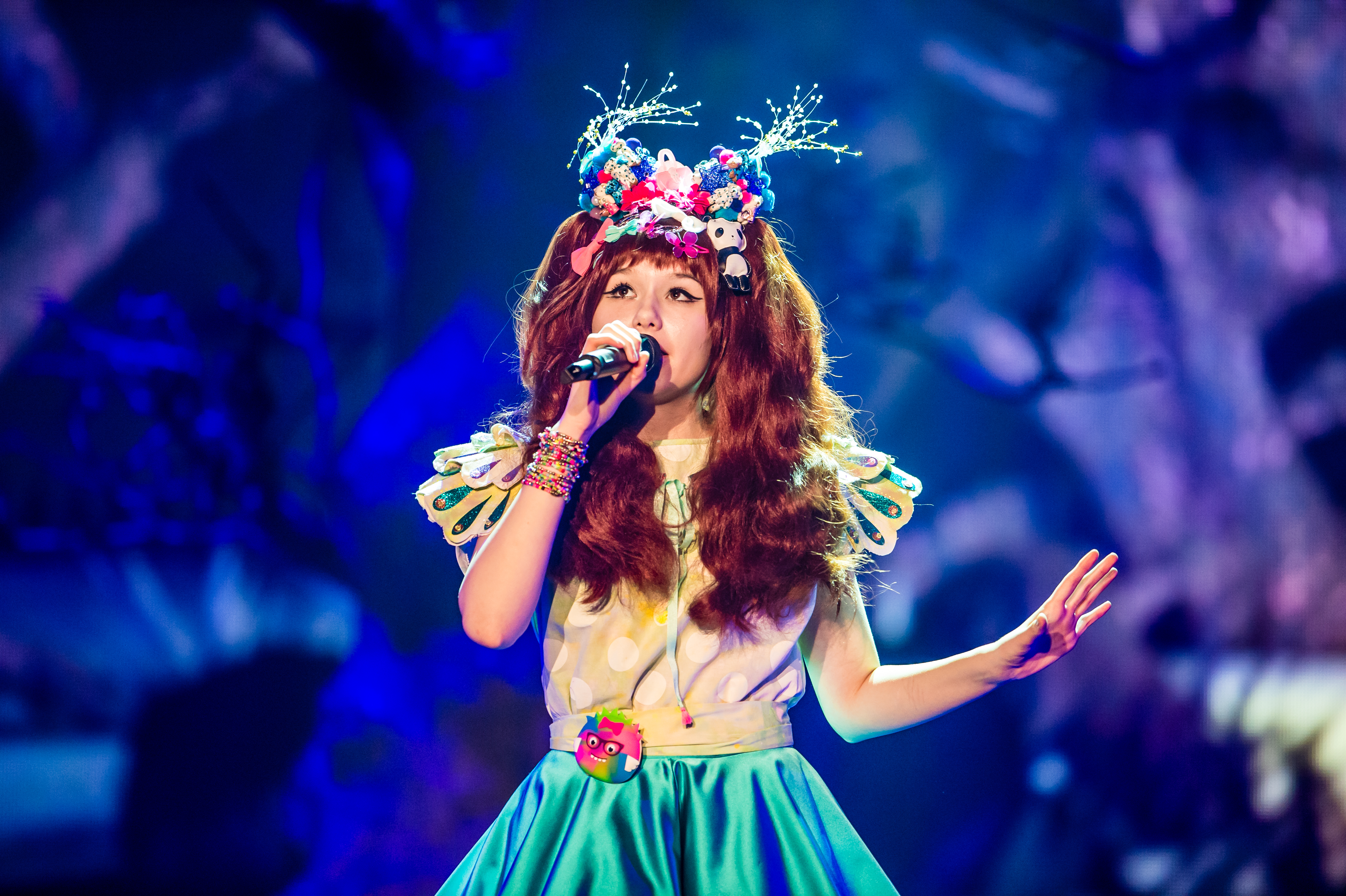 Eurovision Song Contest 2016 - Unser Lied für Stockholm - Jamie-Lee Kriewitz